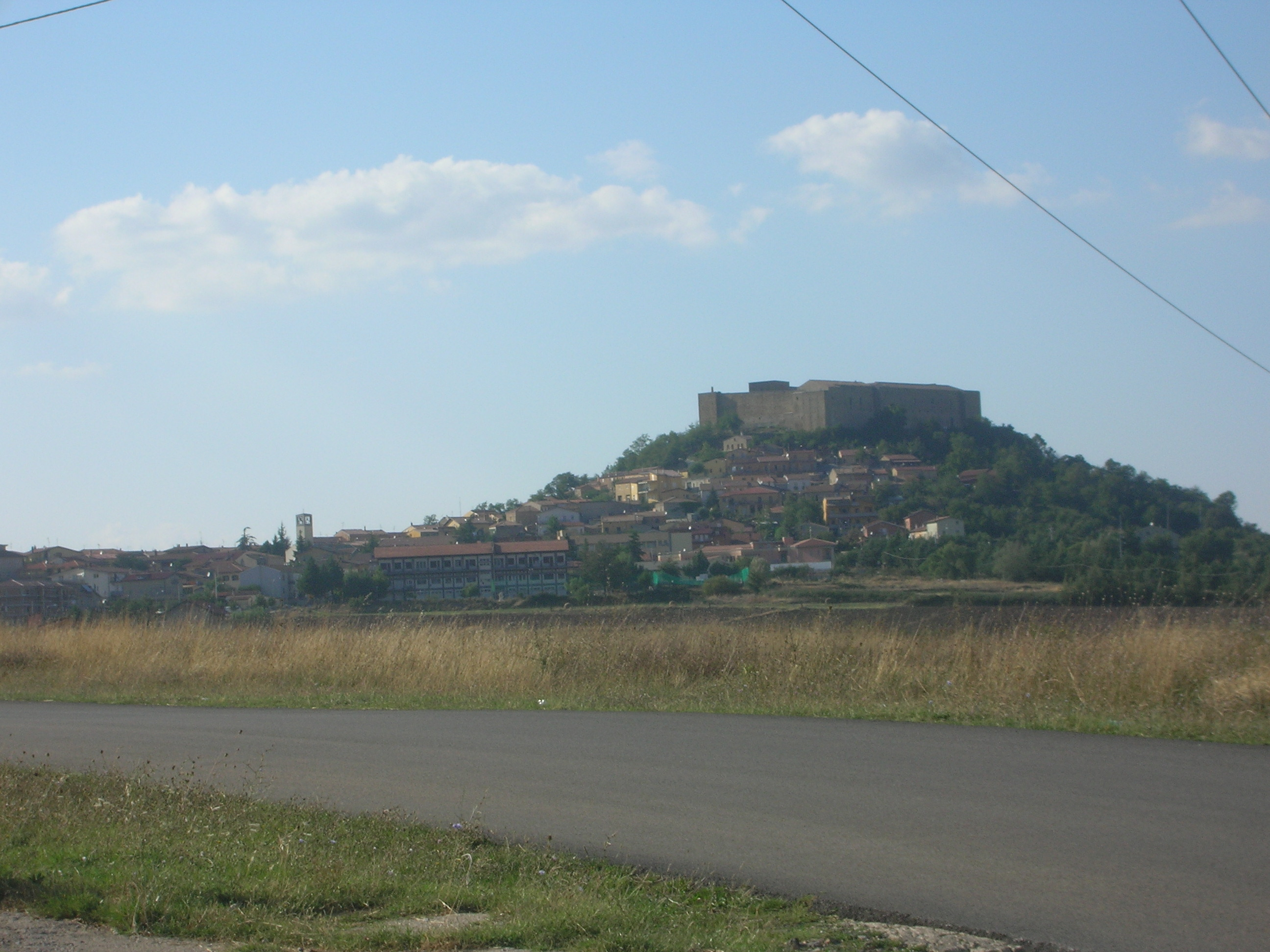 veduta di Lagopesole (Potenza)